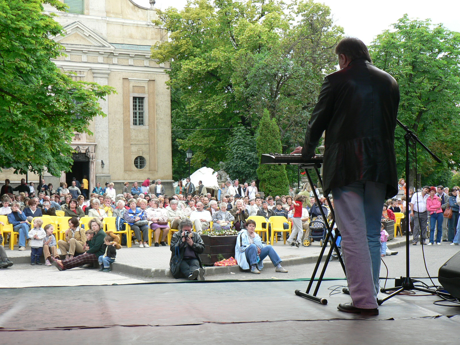 Balázs Fecó és közönsége a 2006-os Pilis Lelke Fesztiválon